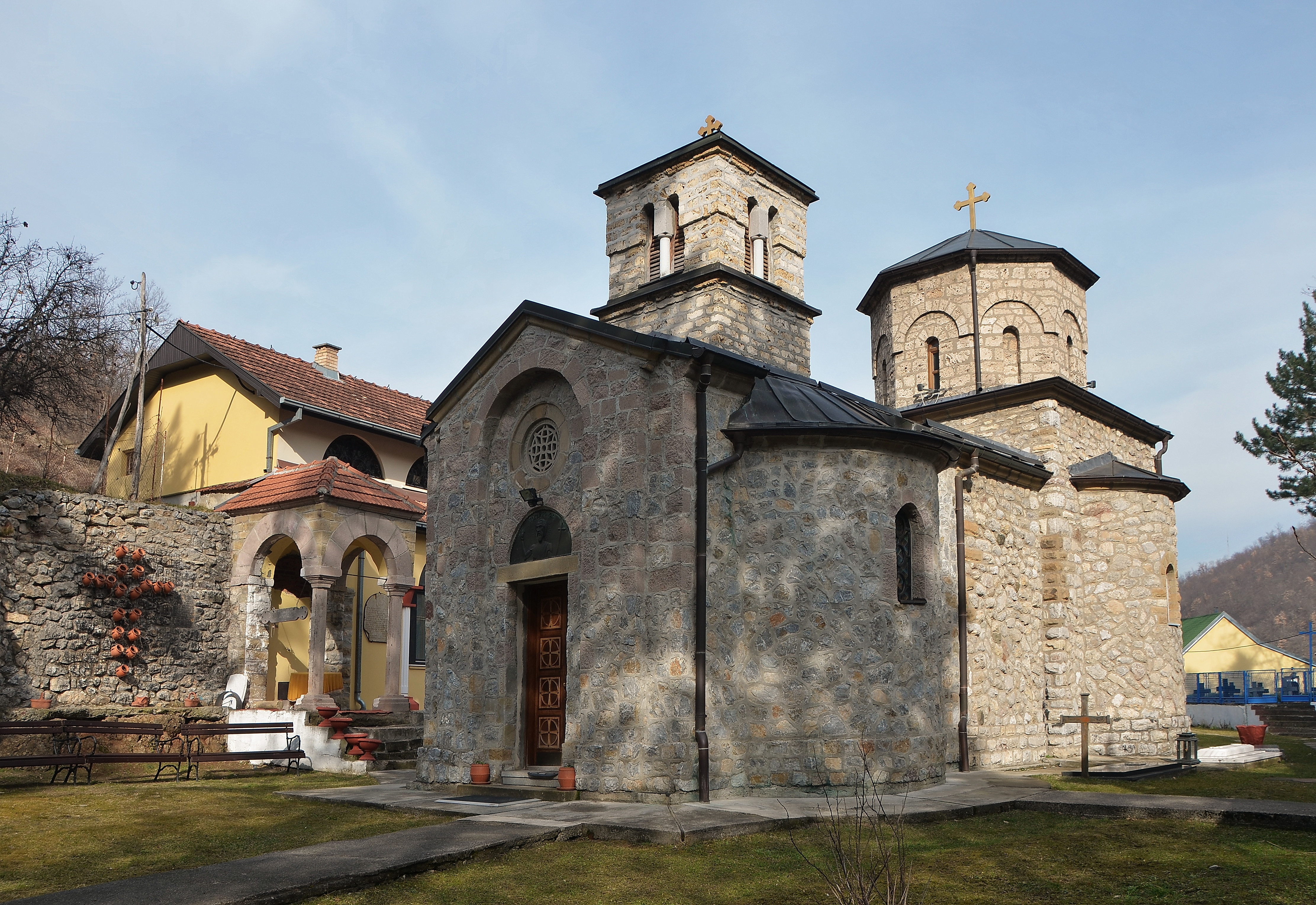 Нова црква озидана је од камена, по угледу на стару, али, нажалост, није сачуван ниједан архитектонски детаљ из старог манастира.